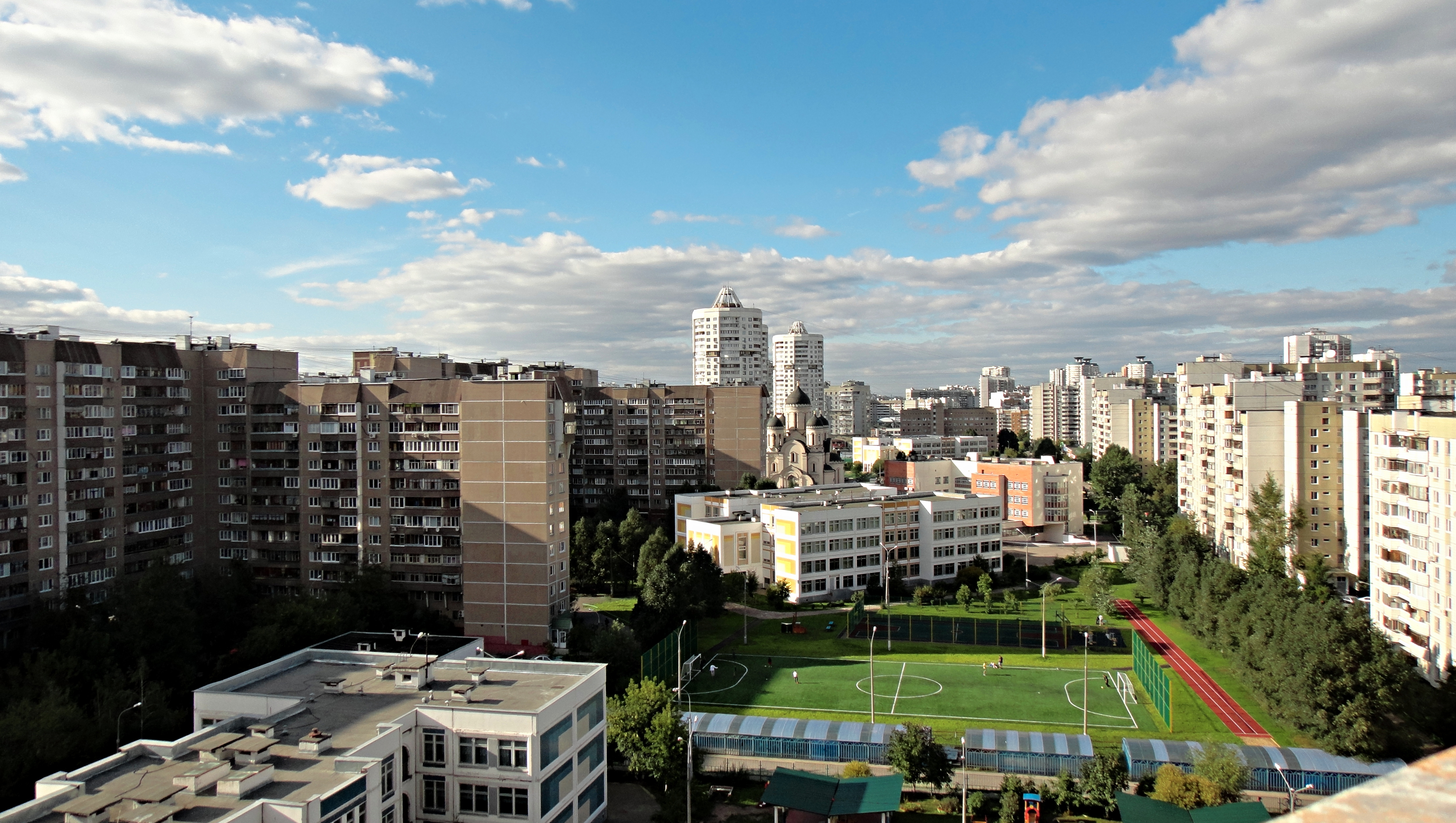 Район Марьино.